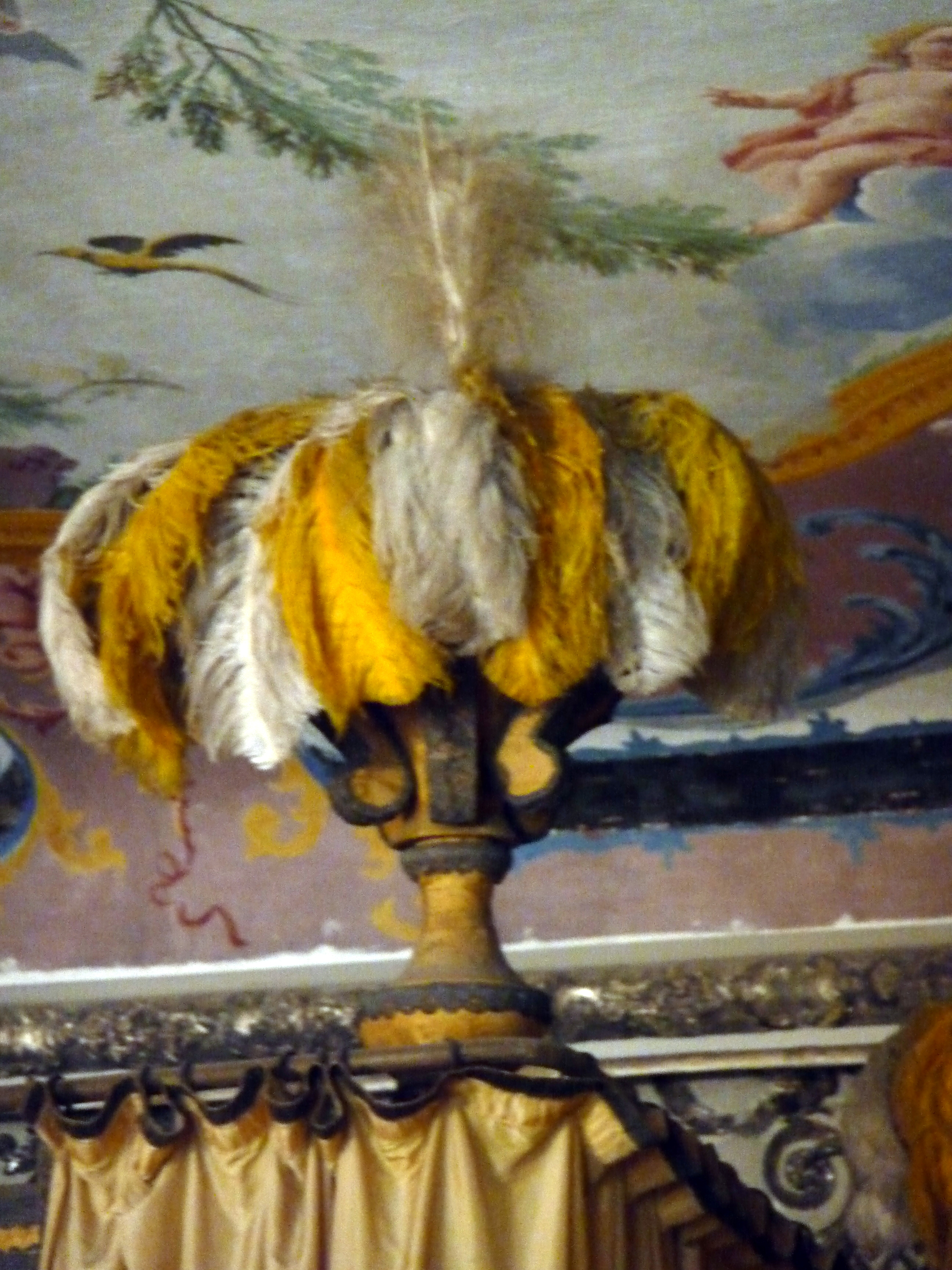 Zweifarbige Straußenfedern in einer Ziervase auf dem Baldachin am Paradebett der Kurfürstin im Neuen Schloss Schleißheim.